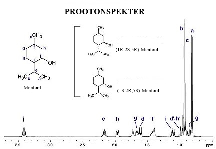 Mentooli prootonspekri interpreteering